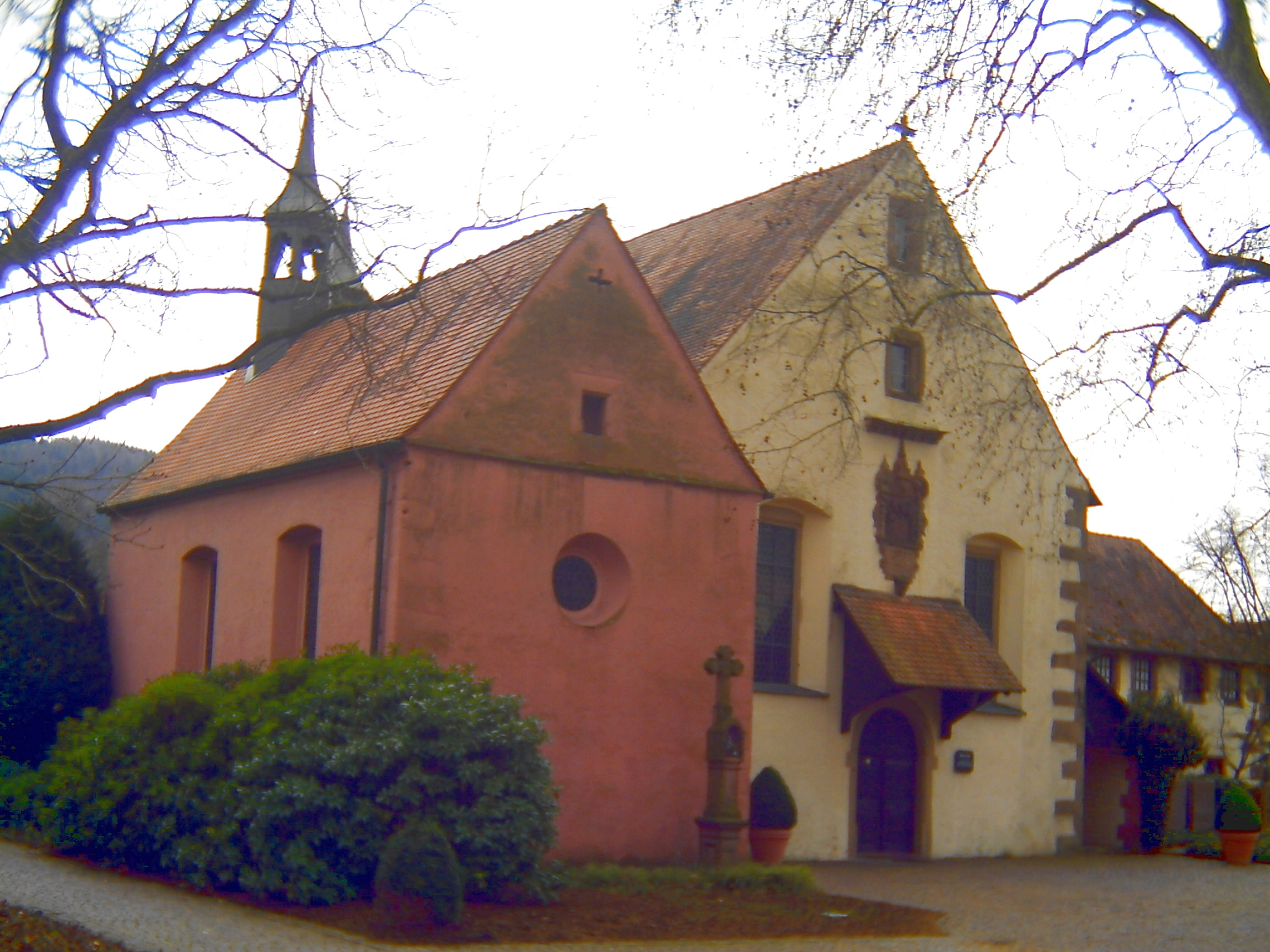 Klostterkirche und Lorettokapelle des Kapuzinerklosters Haslach